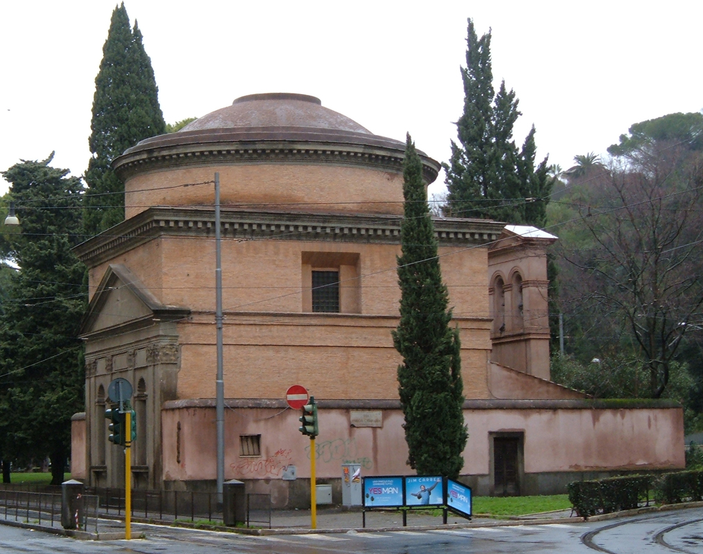 Chiesa di Sant'Andrea del Vignola, a Roma, nel quartiere Flaminio.